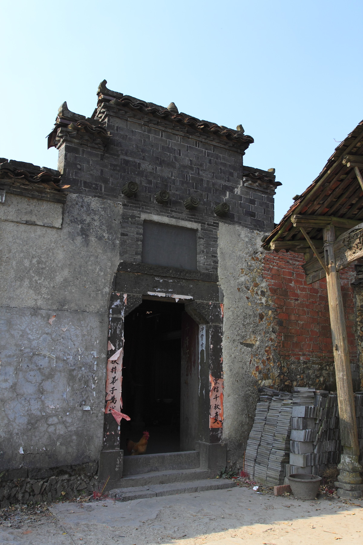 嵩峰山嵩峰寺，位于中国江西省广丰县和浙江省江山市交界处，为两县重点文物保护单位。